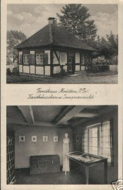 Forsthaus in Moditten bei Königsberg, „Kanthäuschen“